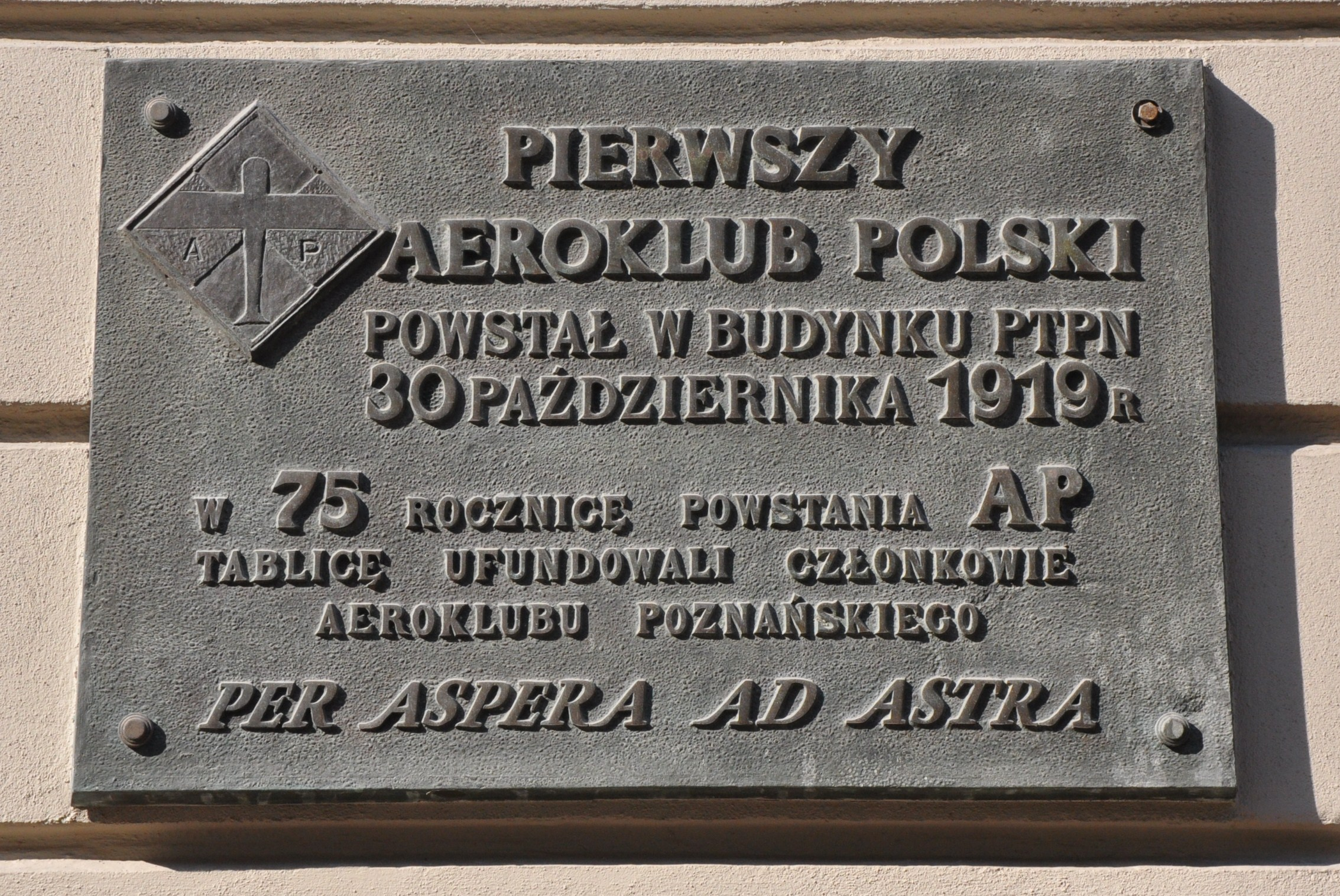 Plaque, Poznań, PTPN-building, Aeroclub Poznań (Poland's first).